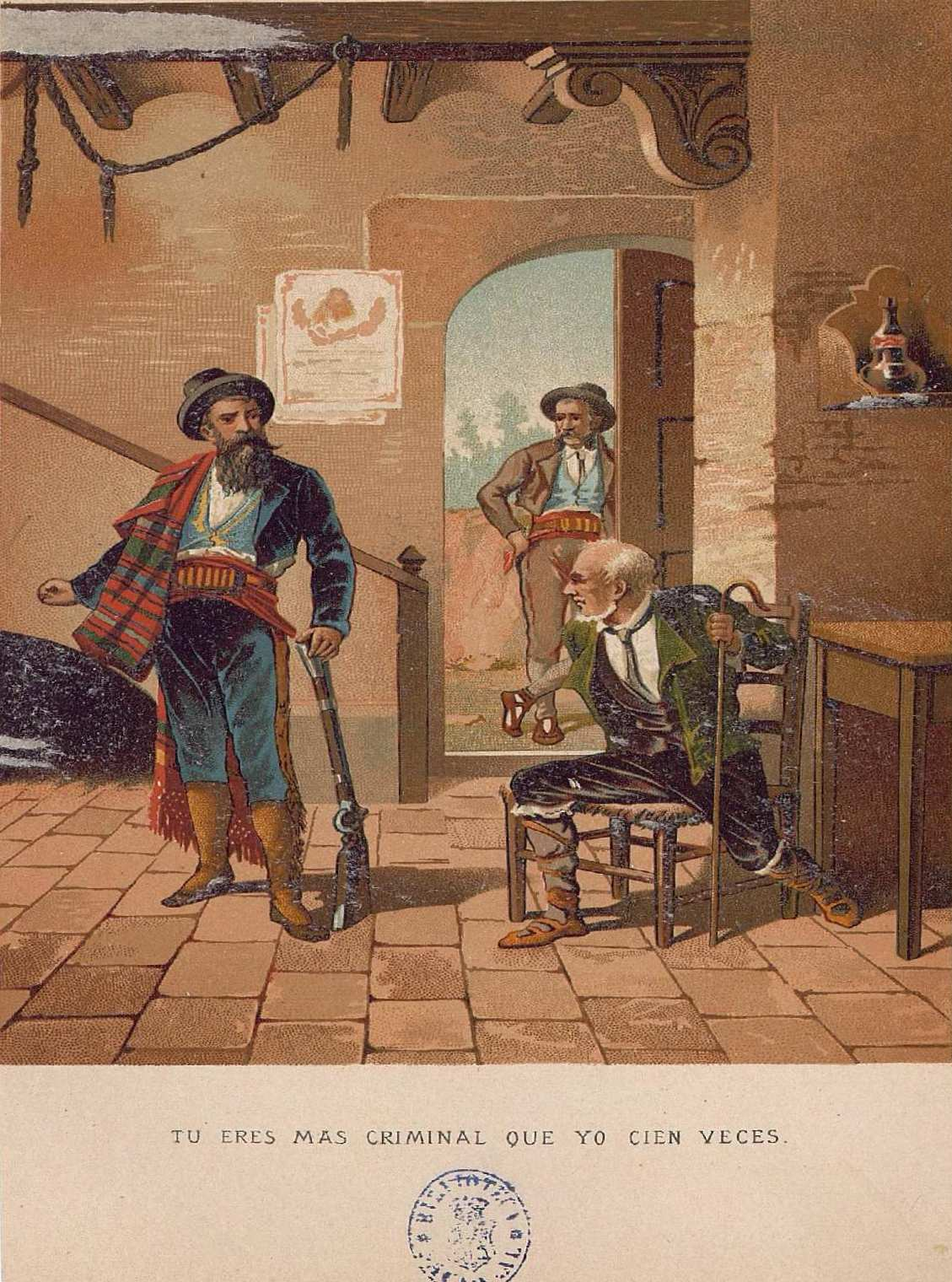 Ilustración de Rafael del Castillo, Los bandidos célebres españoles episodios históricos referentes a los más famosos bandidos / reunidos por Álvaro Carrillo e ilustrados con cromos de reputados artistas, Barcelona, Jaime Seix editor, 1892. T. II, cap. XXIV: Tú eres más criminal que yo cien veces.